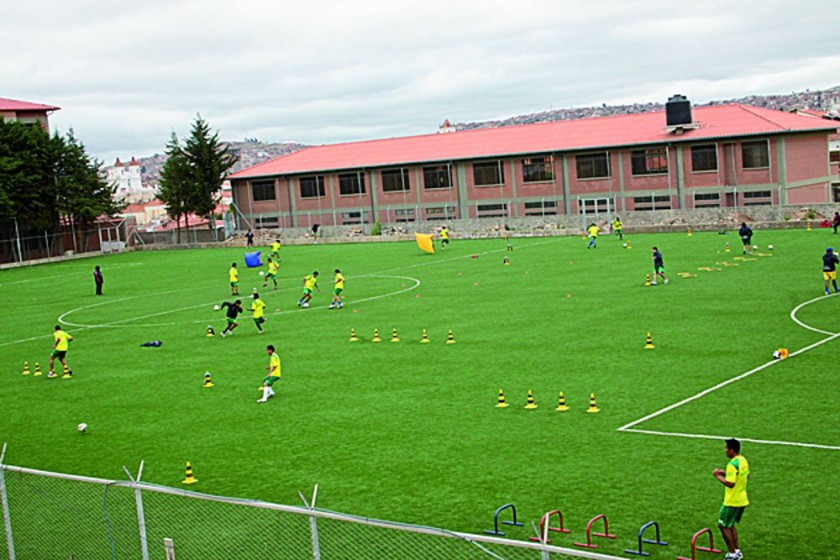 Cancha sintetico de Universitario de Sucre